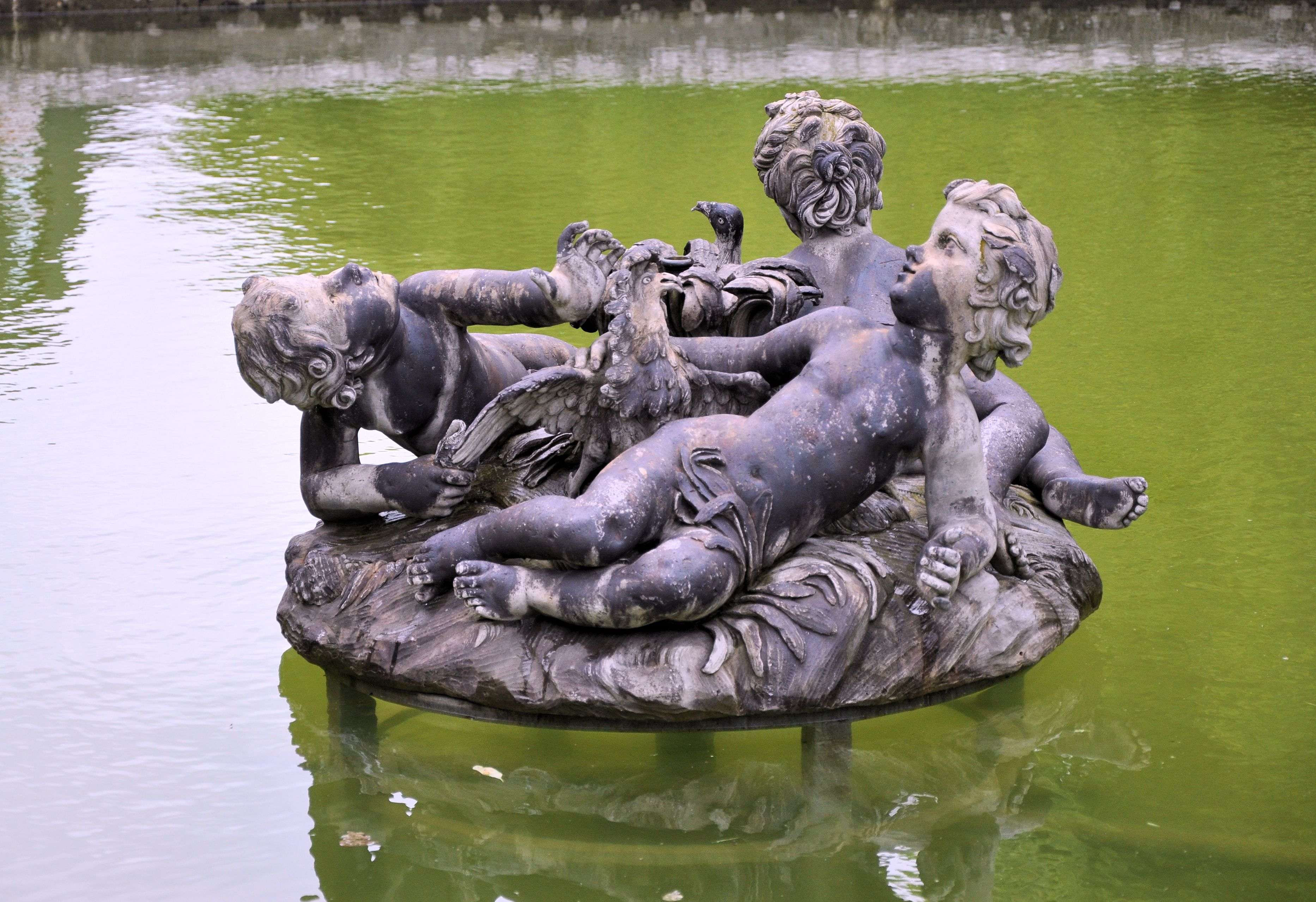 Petit Trianon - Groupe d'enfants d'un bassin du Jardin français